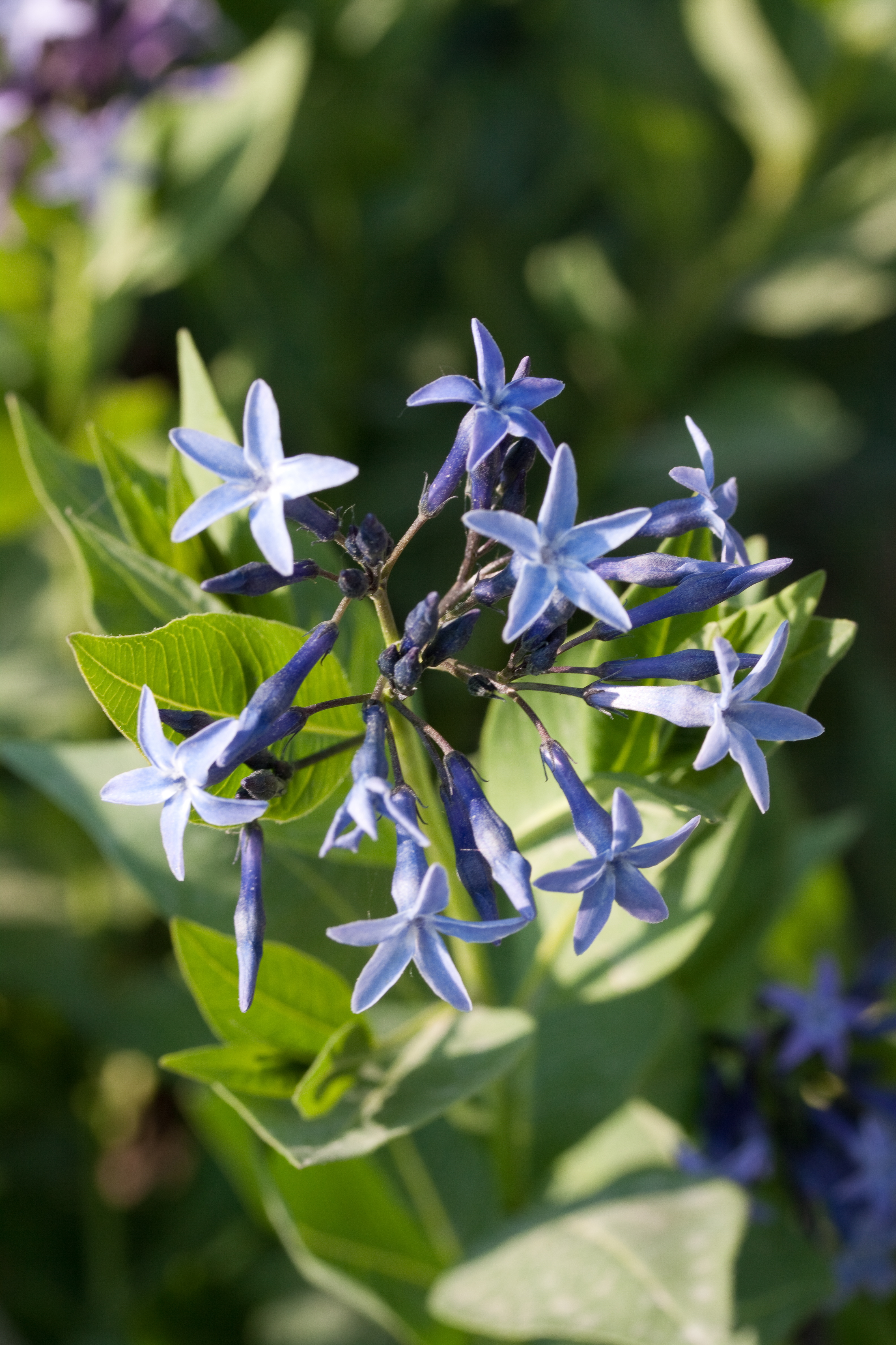 Fleurs de Rhayza orientalis - Jardin des Plantes - Paris